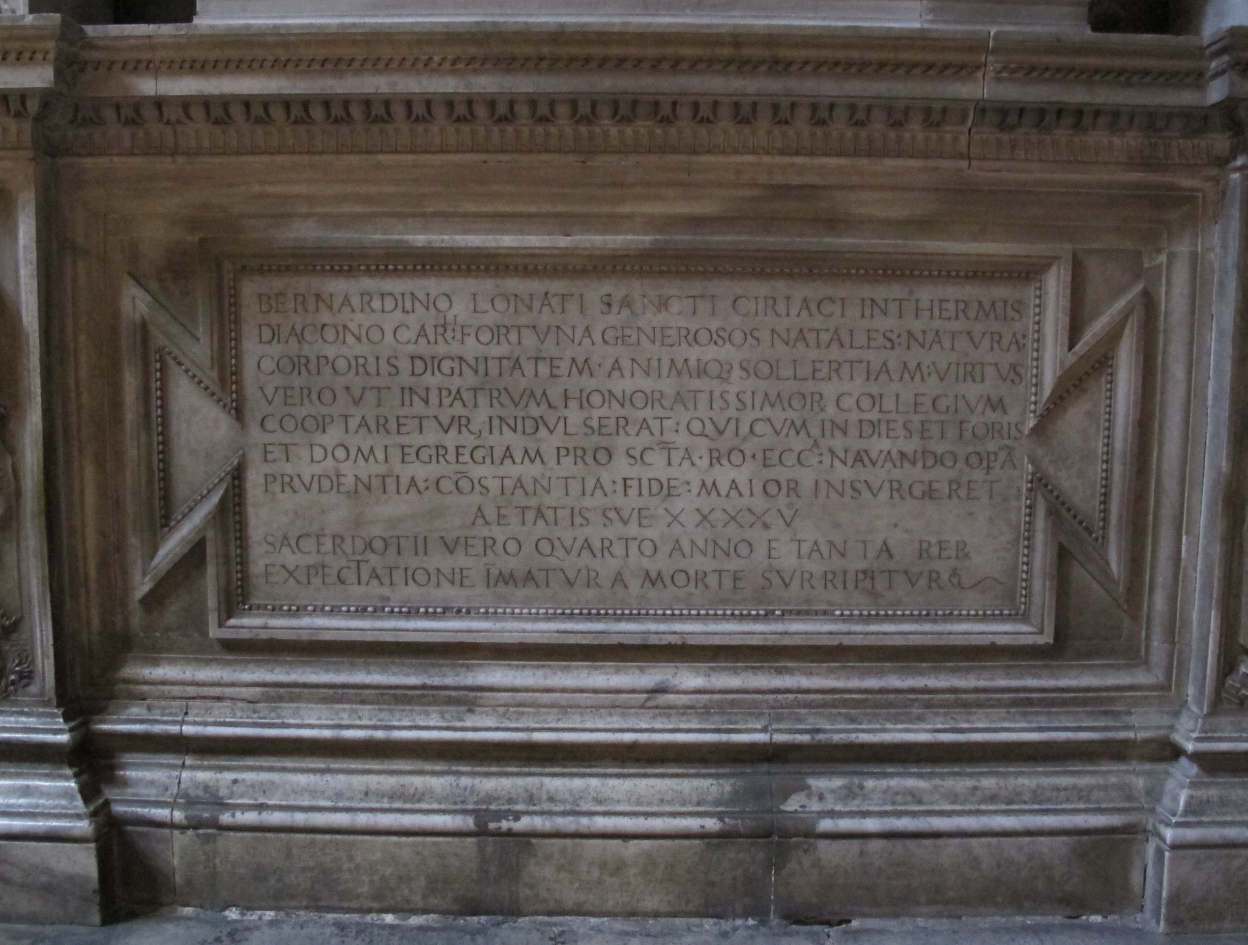 Scuola di a. bregno, monum al card bernardino lonati, 1500 ca.